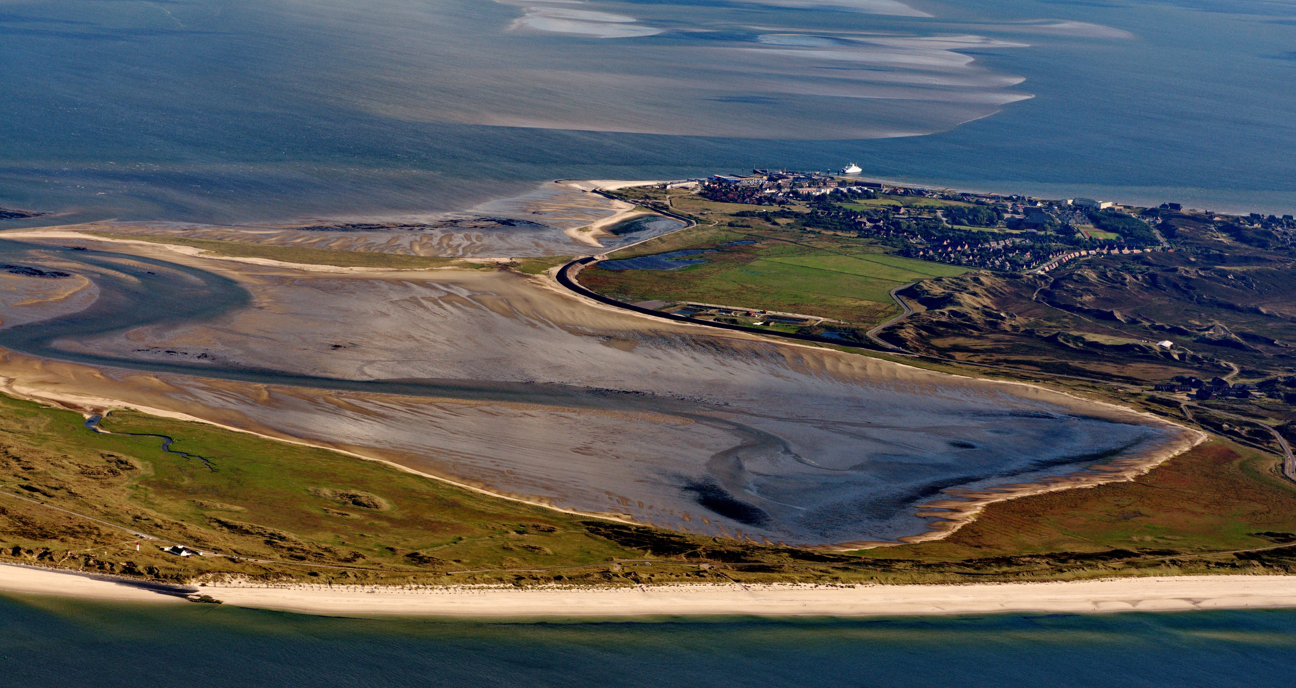 Fotoflug über das nordfriesische Wattenmeer - List auf Sylt (von W, hinten), Königshafen mit Uthörn (Mitte) und Ellenbogen (vorne)